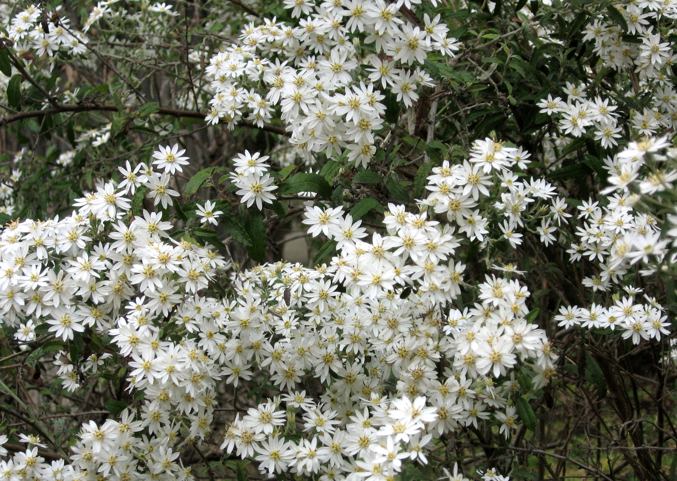 Olearia phlogopappa. Real Jardín Botánico de Madrid.